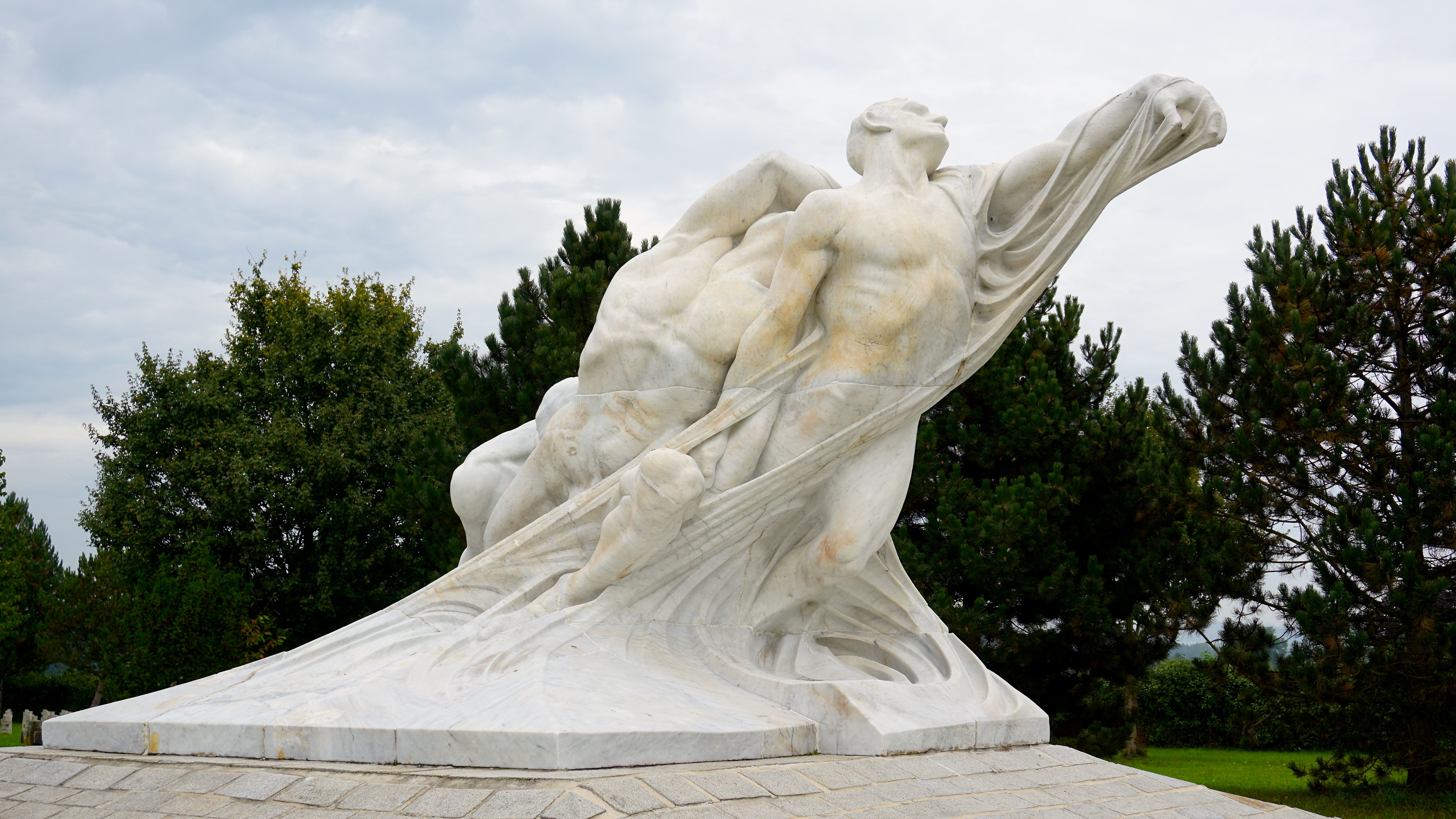 Der italienische Bildhauer Paolo Boldrini, der selbst als Oberleutnant in diesem Lager interniert war, schuf anfangs der 1920er-Jahre im Auftrag der italienischen Regierung eine 4,5 Meter hohe Plastik aus Carrara-Marmor auf einem rund einen Meter hohen flachen Pyramidenstumpf, die am 14. Juni 1922 eingeweiht wurde. Der Sockel zeigt zwischen gepflasterten Granitbändern ein Schriftband aus Carreramarmor mit Inschriften in deutscher und italienischer Sprache. Die Inschrift auf der Ostseite lautet: Erbaut von der königl. ital. Regierung i.J. 1920 über Antrag u. unter Leitung des damaligen Krgref. bei der Hwst Linz Mjr J. Dollansky. Das Denkmal steht unter der Obhut des o.ö. Schwarzen Kreuzes. Die Inschrift auf der Südseite lautet: Hier ruhen in Frieden: Italiener 1759, Serbern 8000, Engländer 3, Franzosen 2, Rumänen 2, Polen 7, Russen 7, Czechoslowaken 5, Ungarn 30, Österreicher 3, Unbekannte 7. Die Inschrift auf der Westseite lautet: Spinti dalle sorti di guerra su questi campi stranieri accomunati dalla sorte in nouve fratellanze profonde figli d´Italia e Serbia qui nell esilio han pce. Possano i nudi spiriti da un alta libera dimora rivedere ogni giorno le dolci patrie lontane. Die Inschrift auf der Nordseite lautet: Aus ihrer fernen Heimat empfehlen Mütter dieses Denkmal der Pietät der edlen oberösterreichischen Bevölkerung.